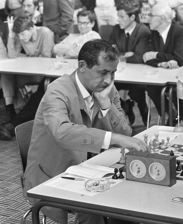 IBM-schaaktoernooi in de RAI te Amsterdam 1969: Leonid Stein.